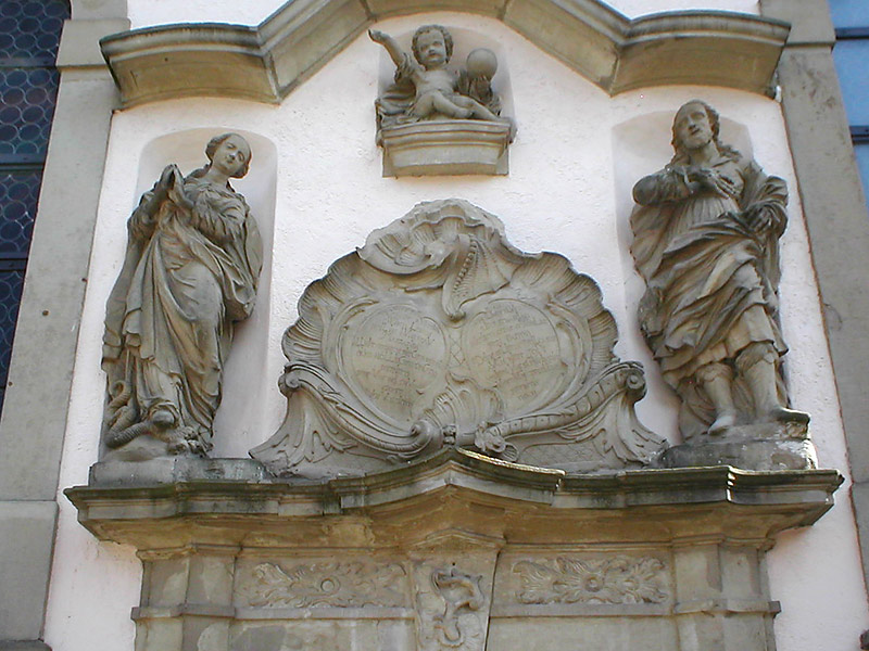 Portaldetail der kath. Kirche in Bad Rappenau-Grombach